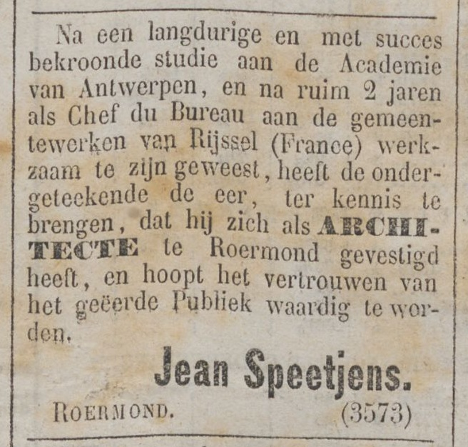 Advertentie afkomstig uit De Tijd, nr. 9985 (10 mei 1880): p. 4.